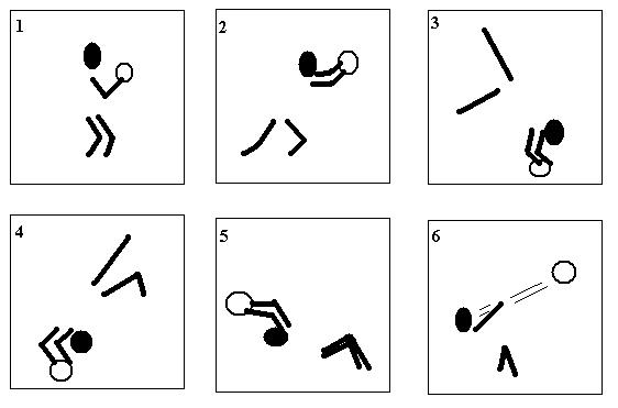 Schema delle rimesse laterali della calciatrice brasiliana Leah